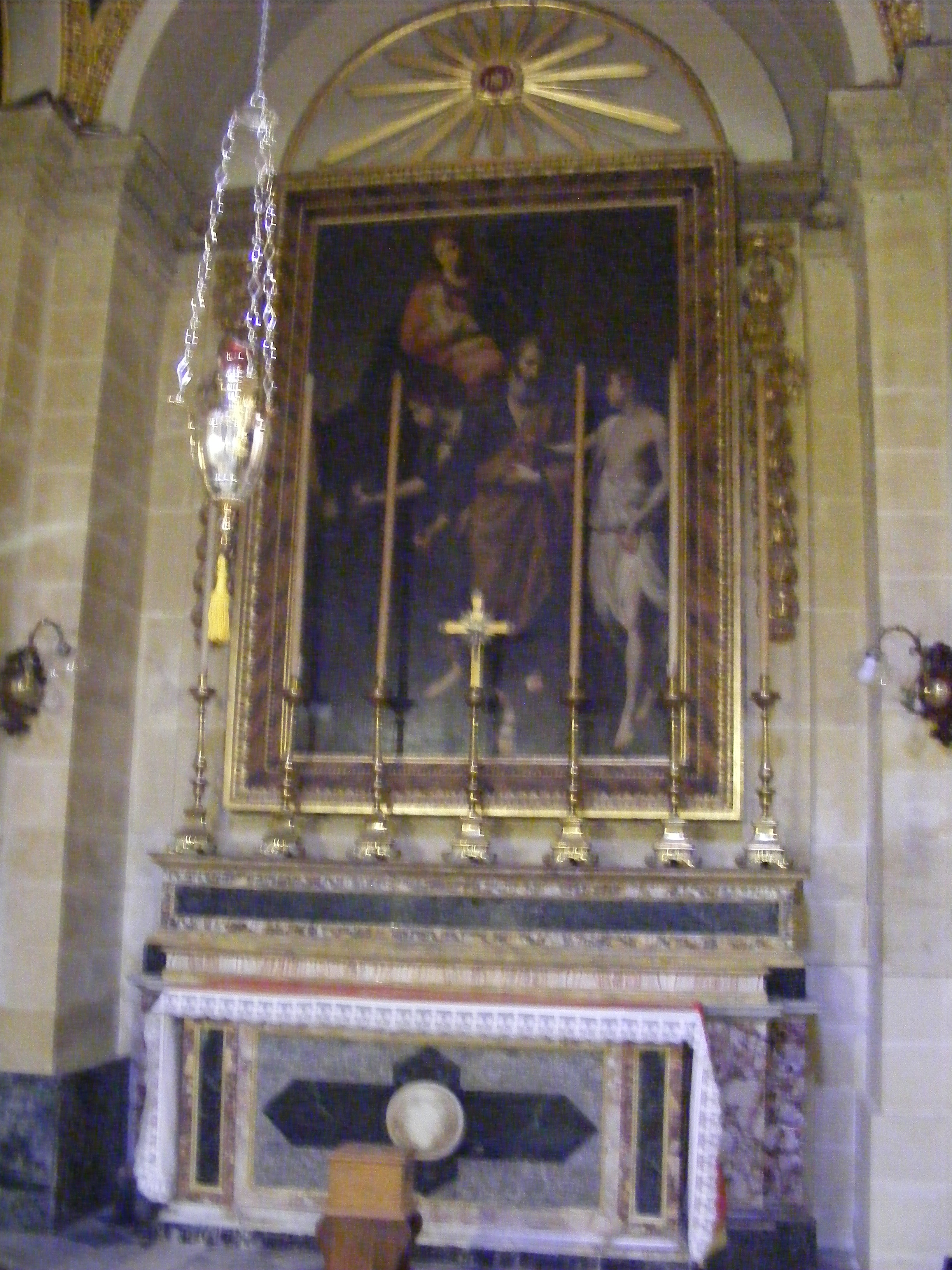 Kaplica św. Józefa z obrazem "Ucieczka Świętej Rodziny do Egiptu" pędzla Michele Basuttila z 1792.